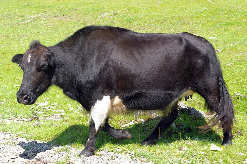 A female dzo.